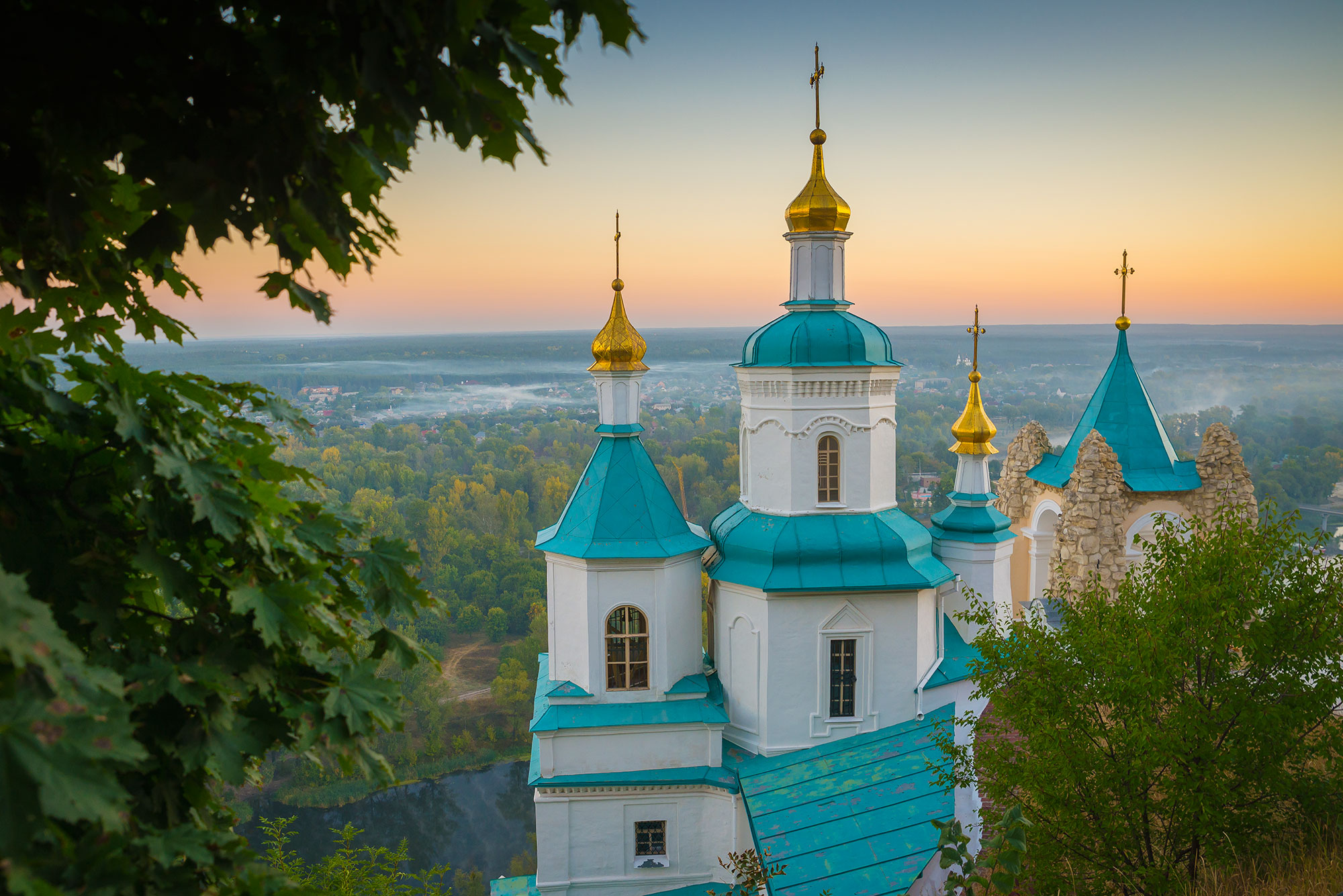 Миколаївська церква, Святогірськ, вул. Зарічна, 1